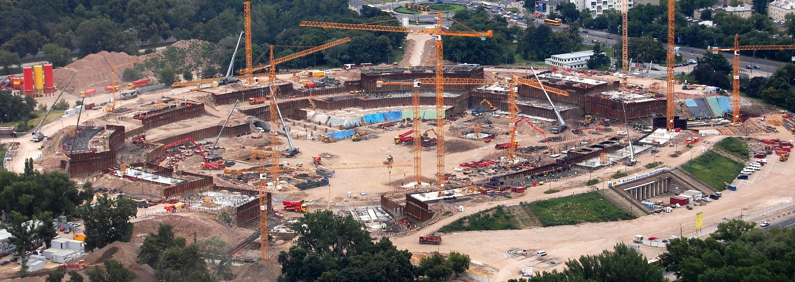 Budowa stadionu narodowego - stan z 14 lipca 2009